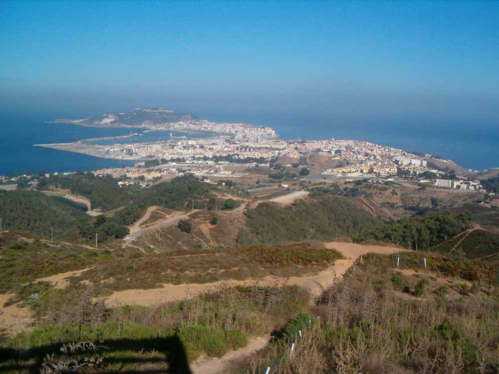 Ceuta desde el mirador de Isabel II